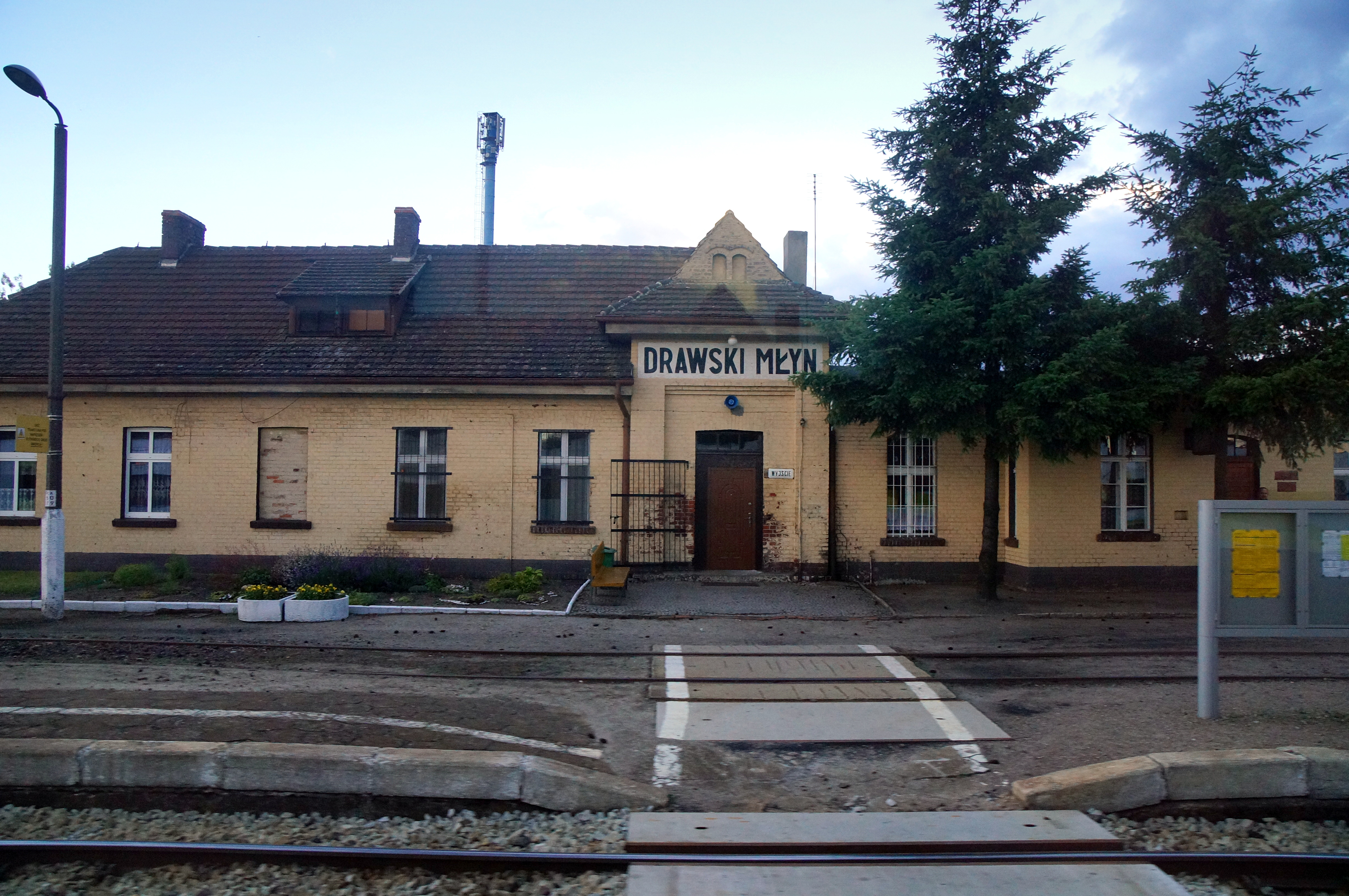 Stacja kolejowa w Drawskim Młynie, w województwie wielkopolskim. Widok z przejeżdżającego pociągu.